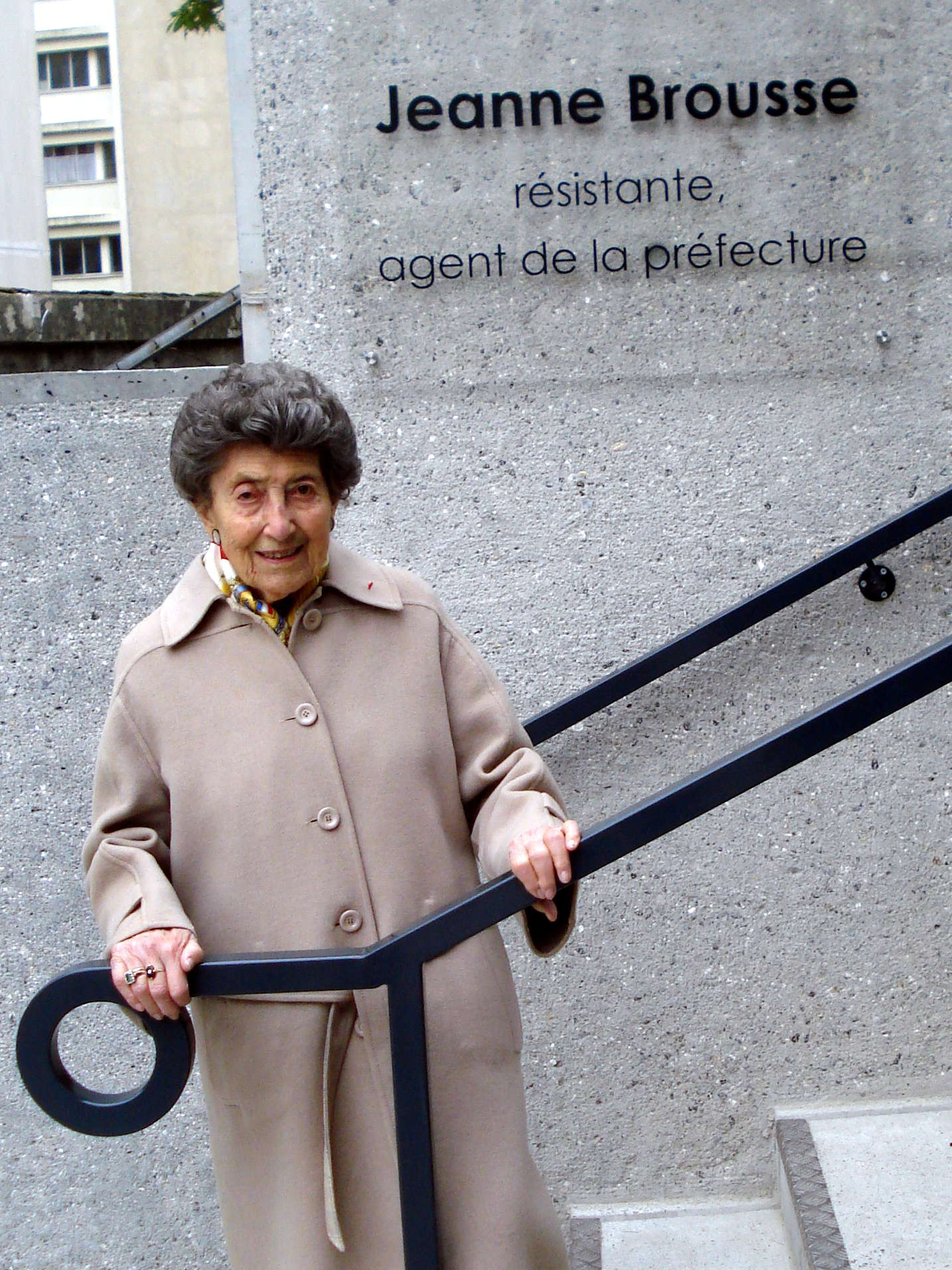 Jeanne Brousse - inauguration des nouveaux locaux dédiés à l'accueil des étrangers à la préfecture de Haute-Savoie- 18 avril 2014